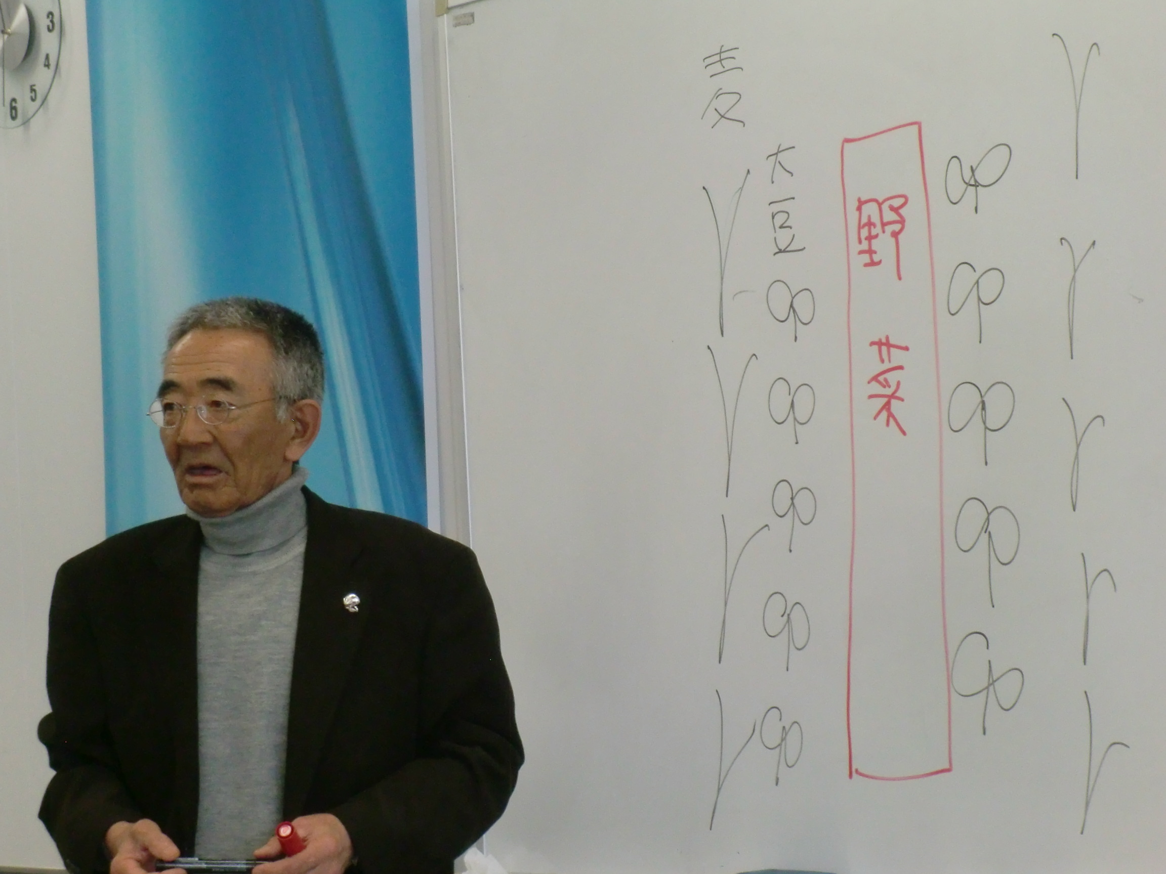 木村秋則混植